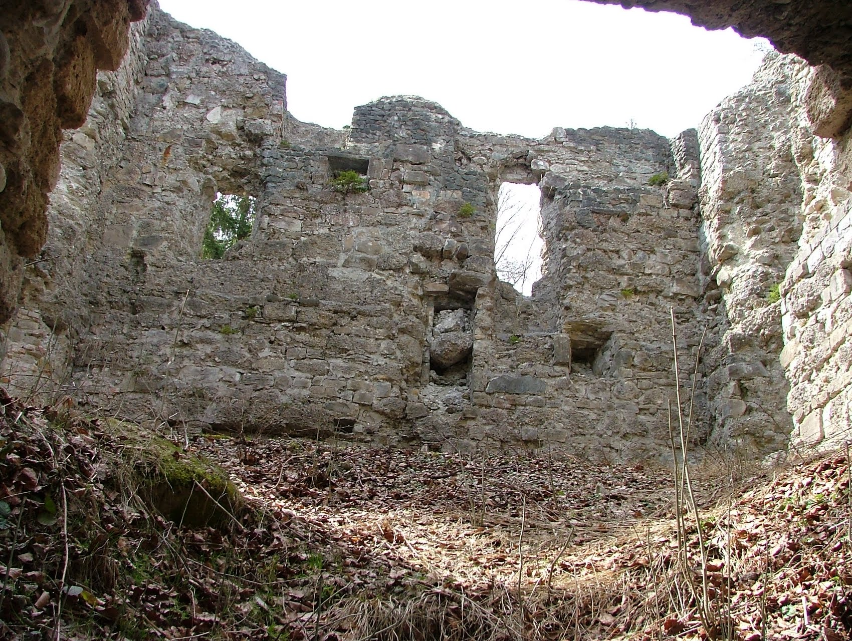 Waltenhofen